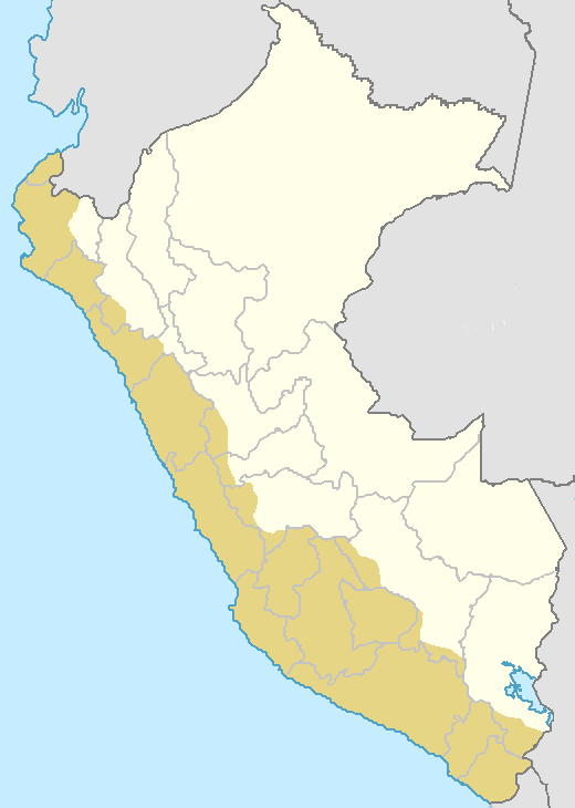 Mapa con las zonas donde hay sequías sin importan si son espontaneas o permanentes